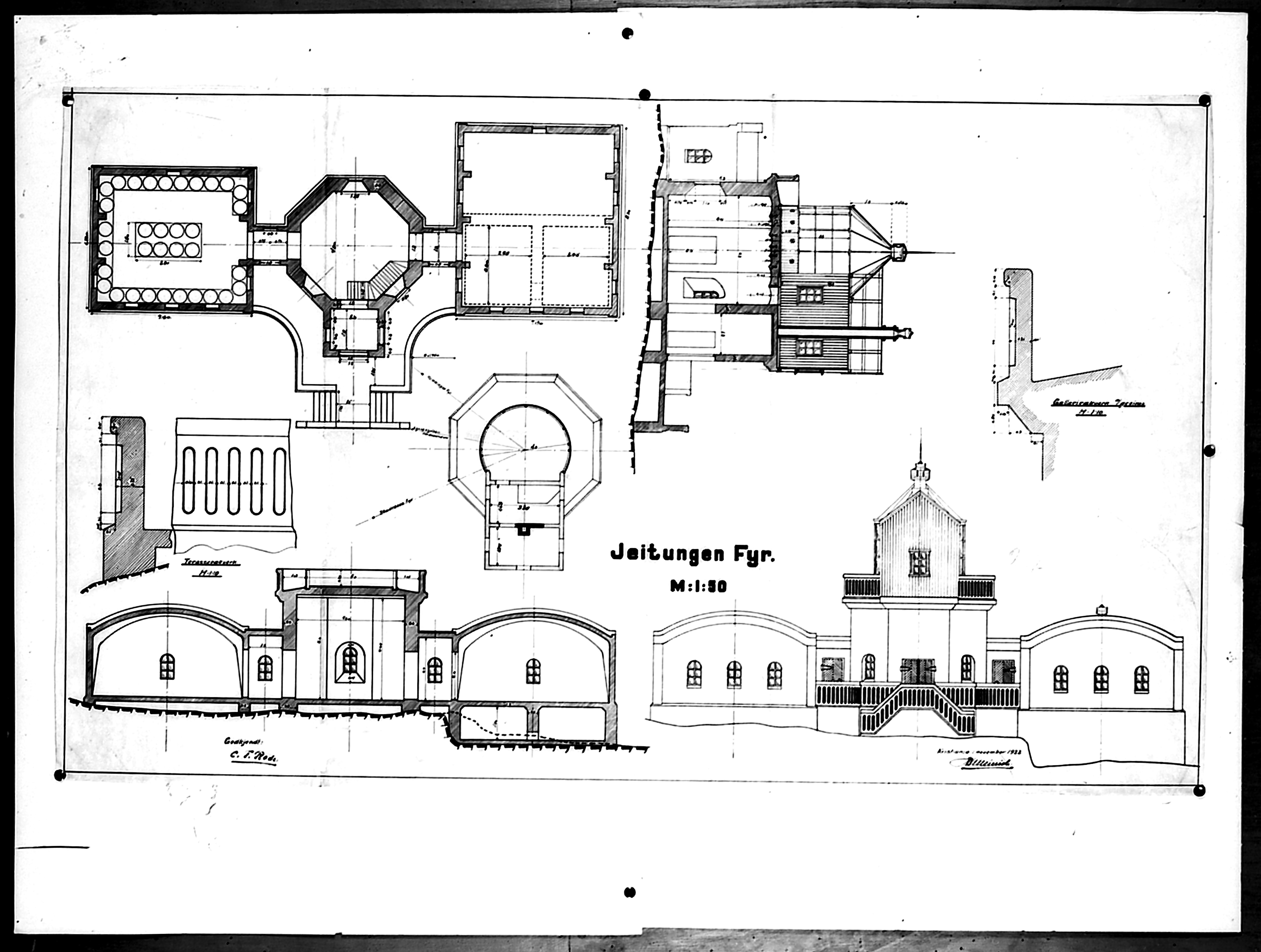 Bildet er hentet fra Arkivverket. Geitungen, Karmøy. Bygningstegning Arkivinstitusjon : Riksarkivet Arkivnavn : Fyrdirektoratet Sted : Norge, Rogaland, Karmøy, Emneord: Fyr, Kyst Avbildet